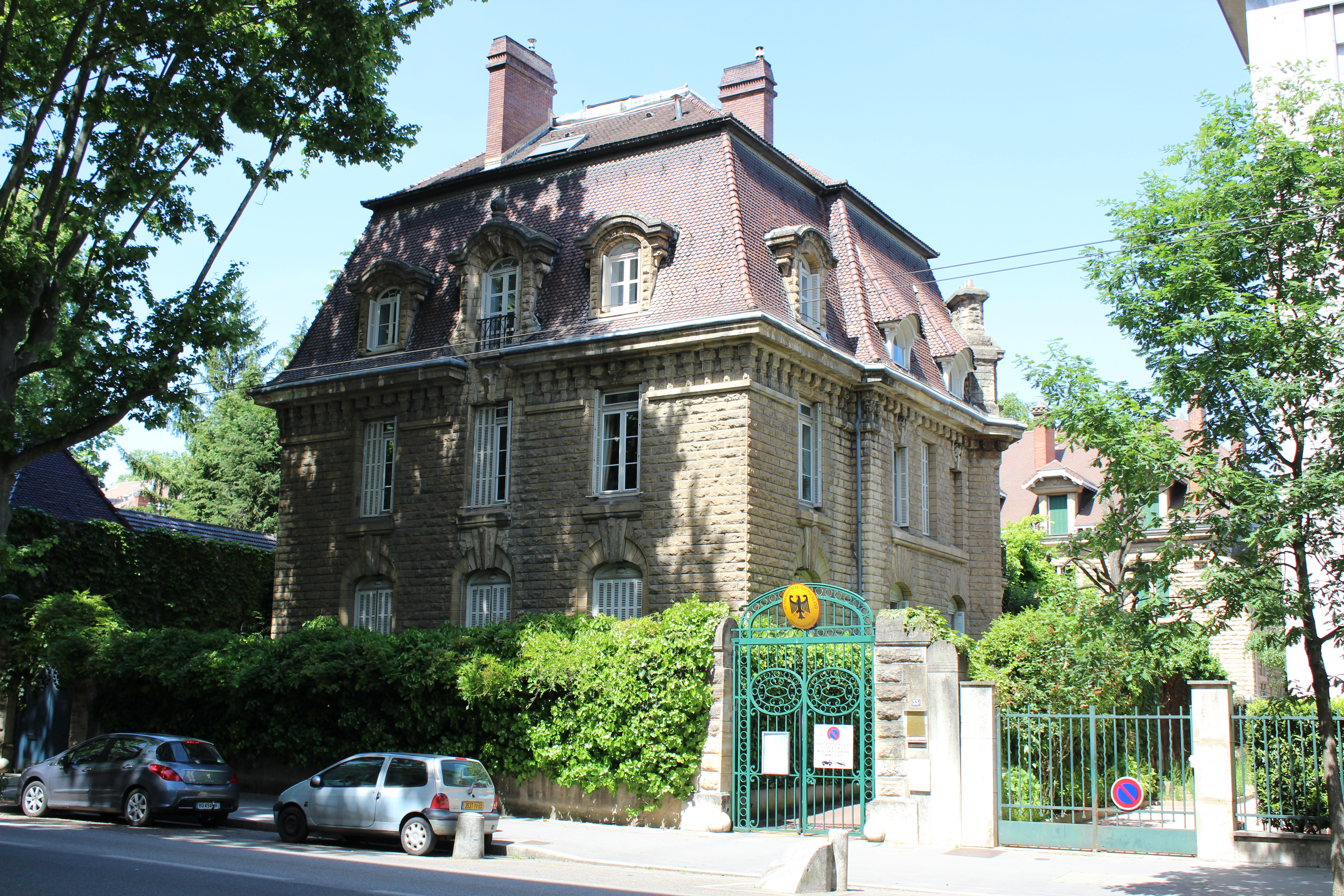 33 Boulevard des Belges - Consulat Général d'Allemagne.